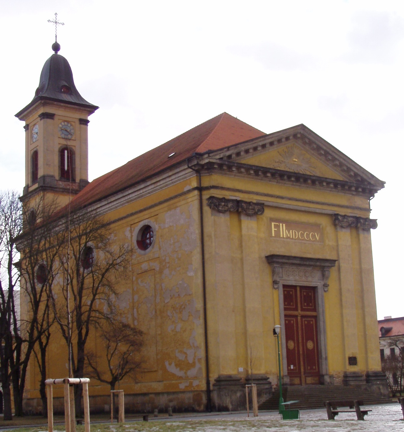 Jaroměř-Josefov, kostel Nanebevstoupení Páně